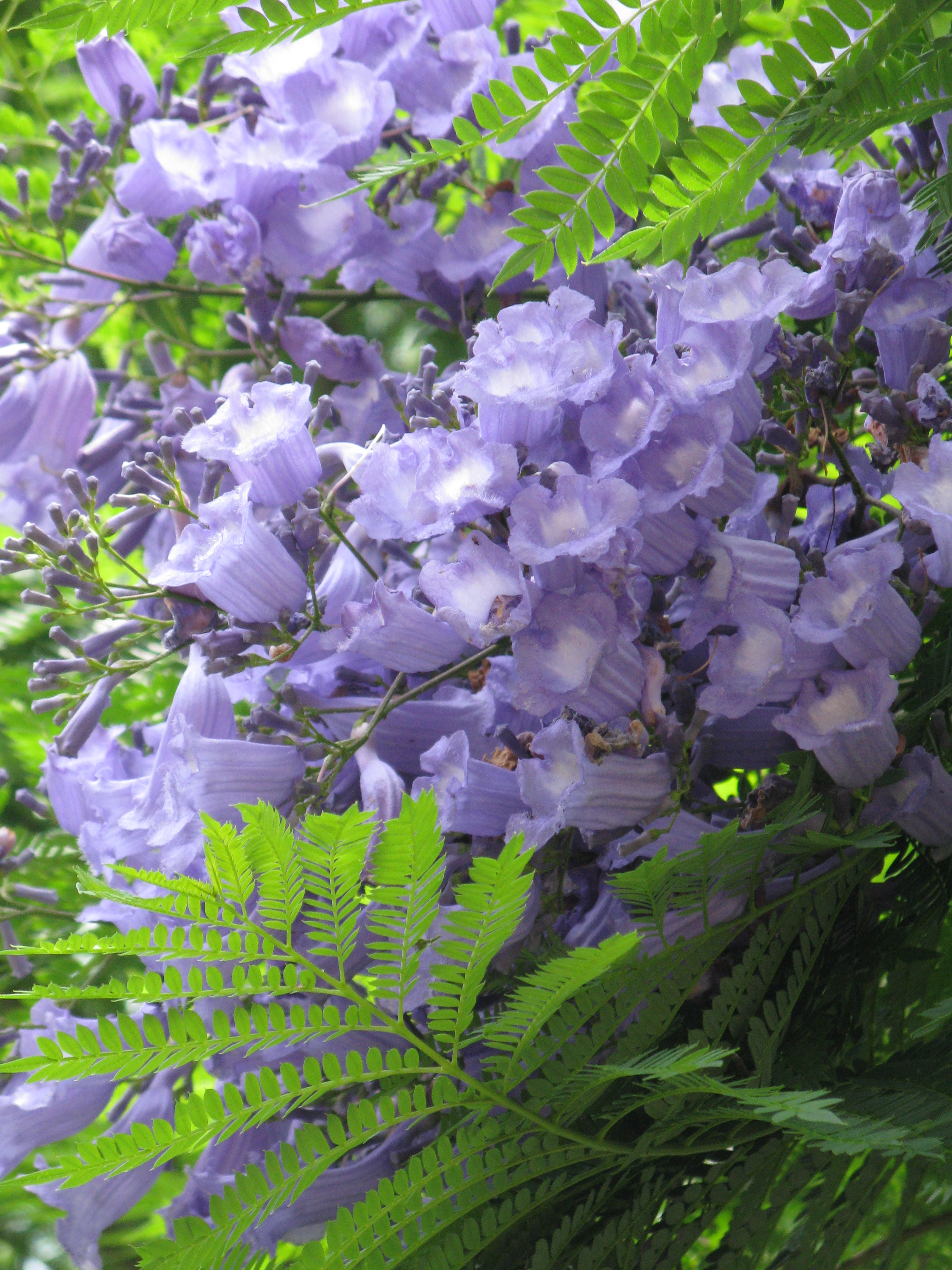 Scientific name Jacaranda mimosifolia